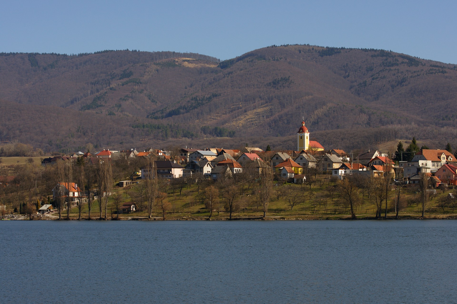 972 26 Nitrianske Rudno, Slovakia